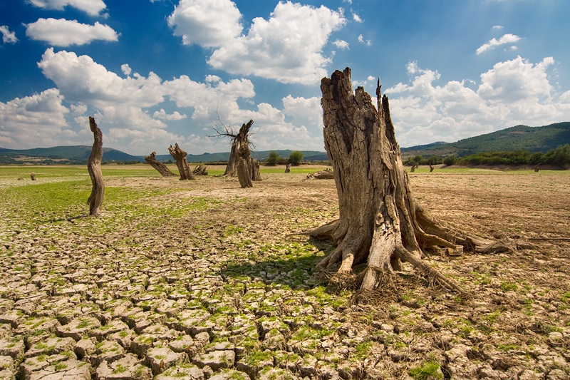 Ivaylovgrad Reservoir, Haskovo Province, Bulgaria